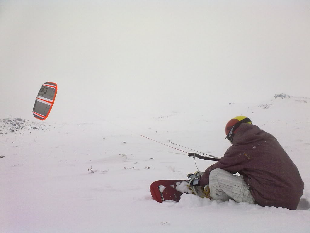 Сноу кайт на платото на Витоша